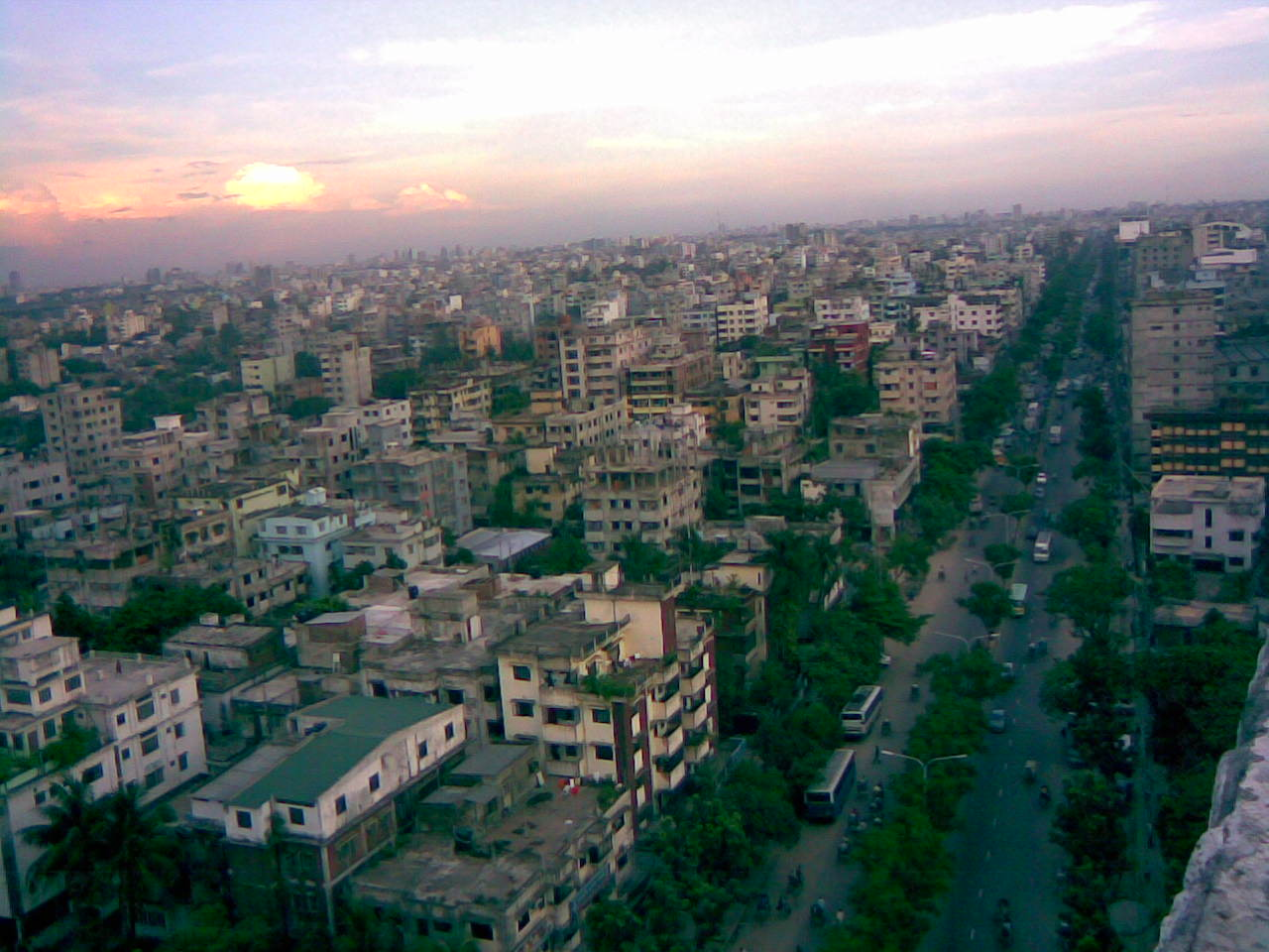 Pallabi, Mirpur, Dhaka, Bangladesh.